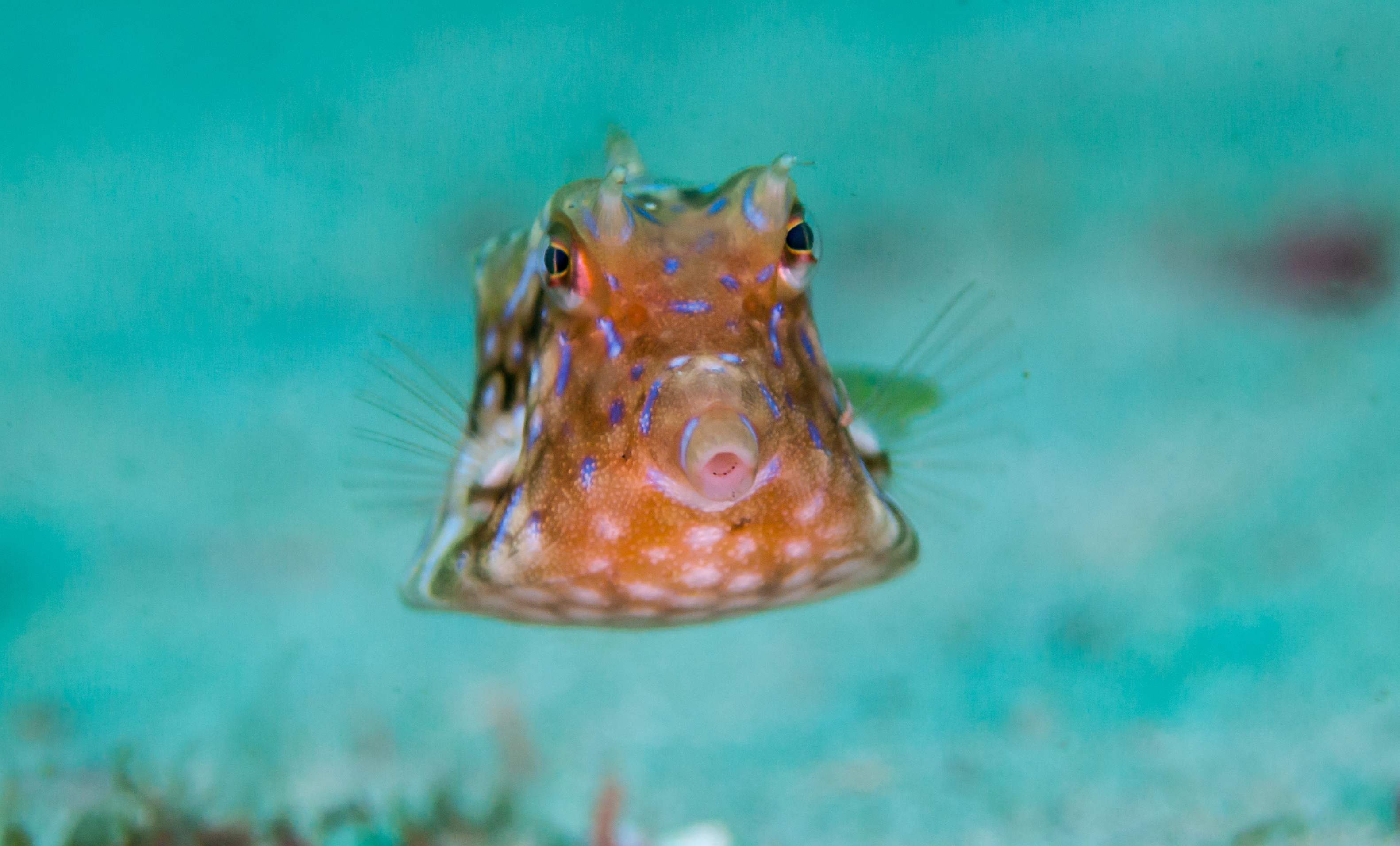 Thornback Cowfish memiliki sepasang duri besar yang berada ke depan di depan mata. Spesies ini hidup di perairan tropis, dan beberapa perairan laut Indo Pasifik yang beriklim hangat. Memiliki racun unik dibanding racun-racun ikan yang lain; Pahutoksin (sebelumnya disebut ostracitoxin), adalah neurotoksin yang hadir dalam sekresi mukus kulit ikan ini (Ostraciidae), dan muncul bila hewan tersebut dalam kondisi tertekan. Gambar diambil di perairan Teluk Padang Jepun, Padang Bai, Bali